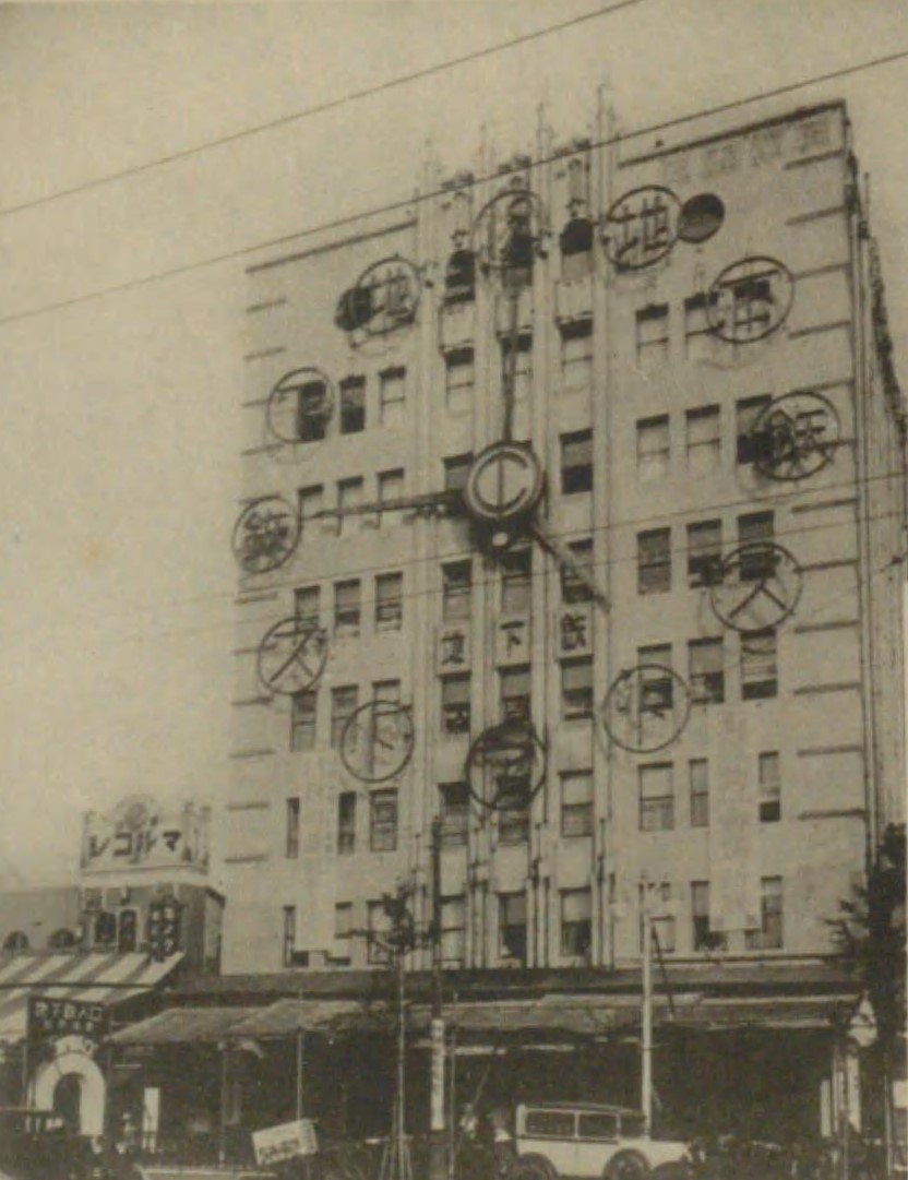 東京地下鉄道（後の帝都高速度交通営団、現・東京地下鉄）が運営していた上野の地下鉄ストア。建物は現在、東京地下鉄本社ビルに建て替えられている。